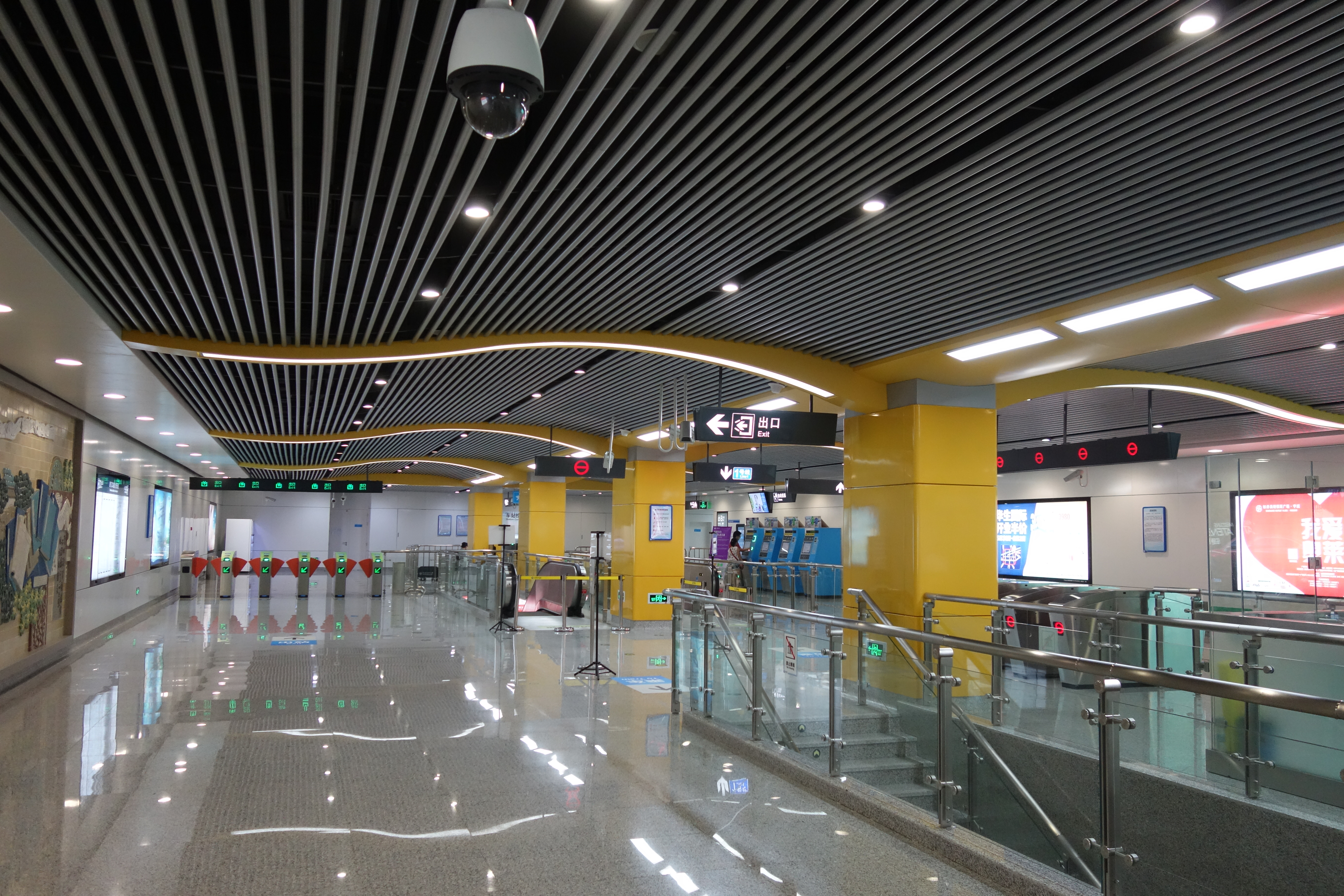 西门口站站厅